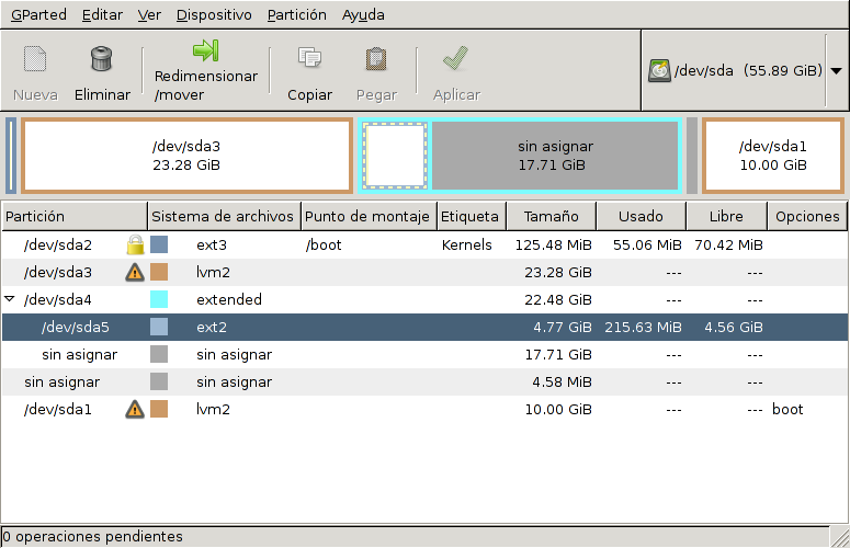 Pantallazo de Gparted sobre Debian Squeeze